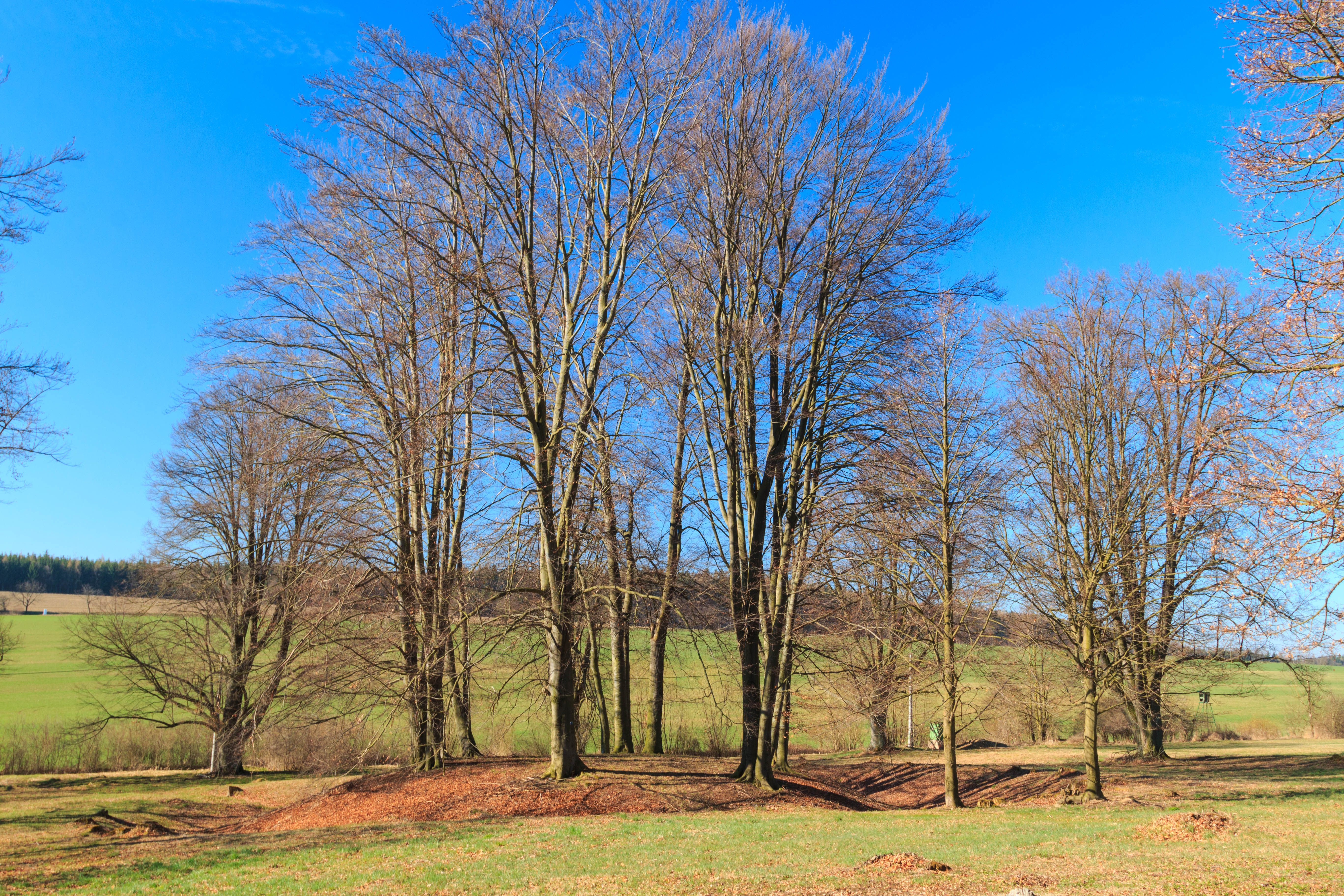 Tvrz, Bílý Kůň.